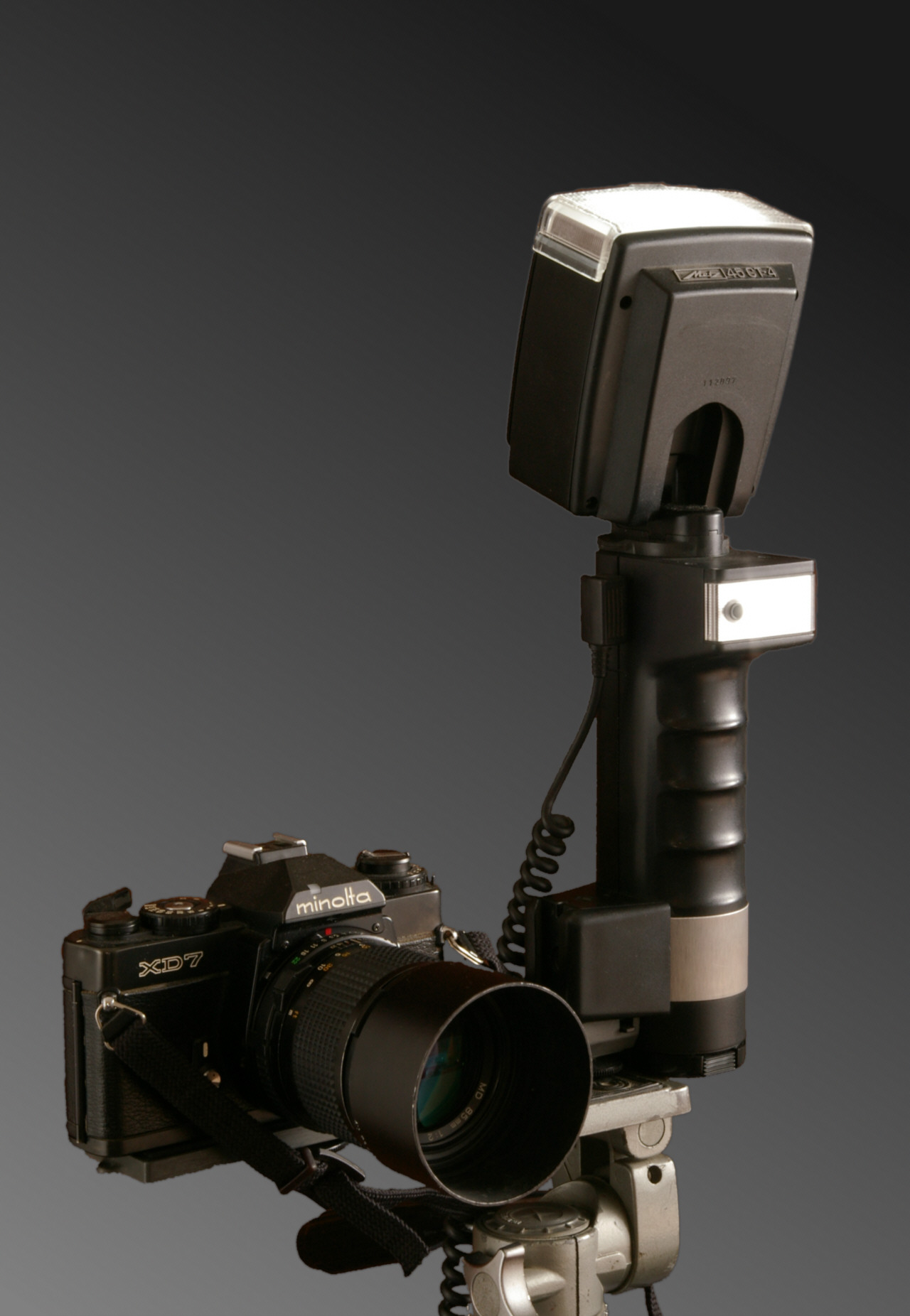 Blitzgerät mit Schwenk- und Zusatzreflektor in Aktion. Metz 45CT5 an Minolta XD-7